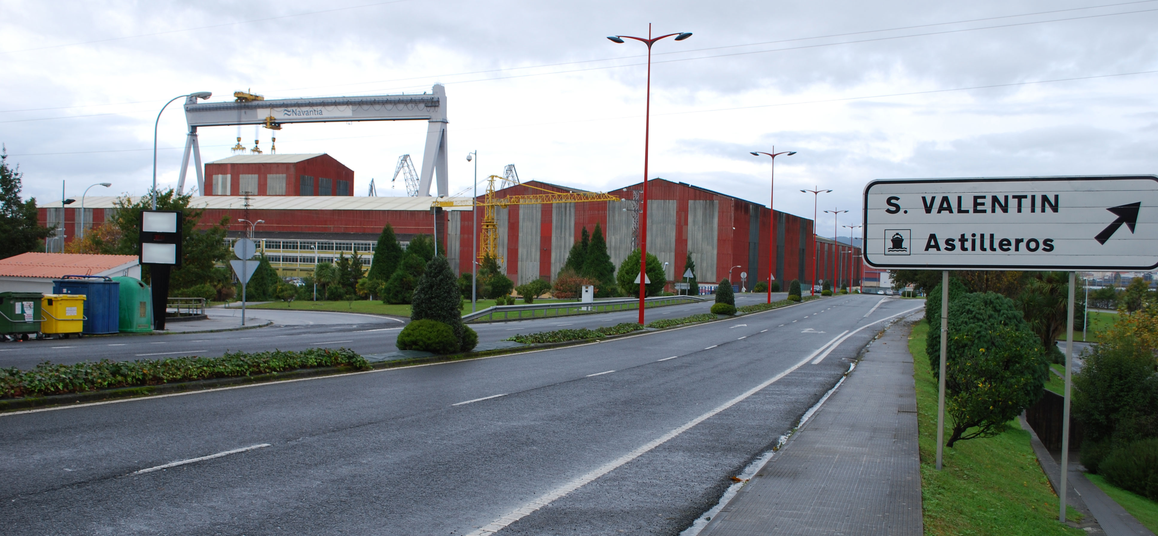 Vista do punto negro da ponte das pías Fene A Coruña Galiza Spain